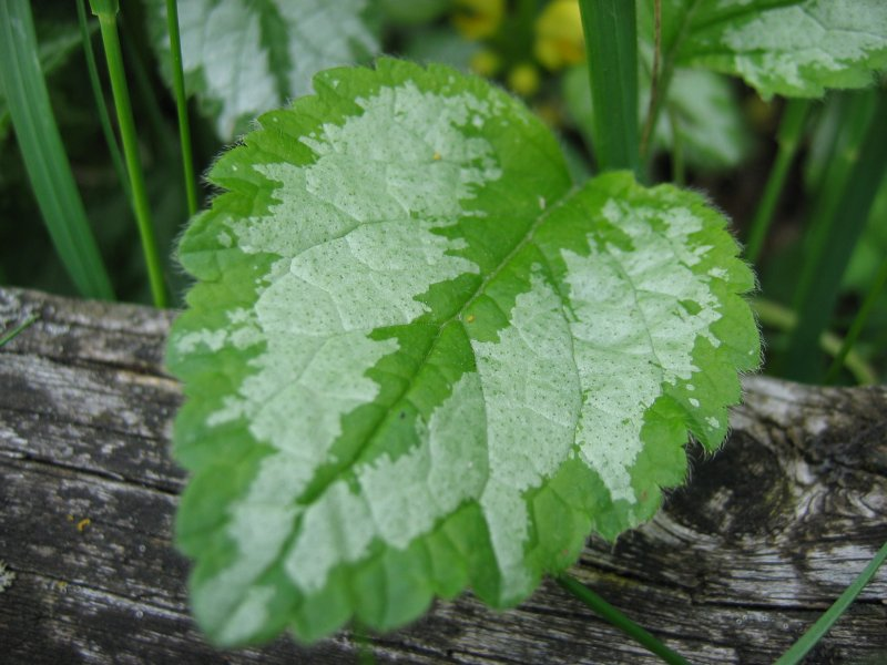 Silber-Goldnessel Galeobdolon argentatum, Rügen